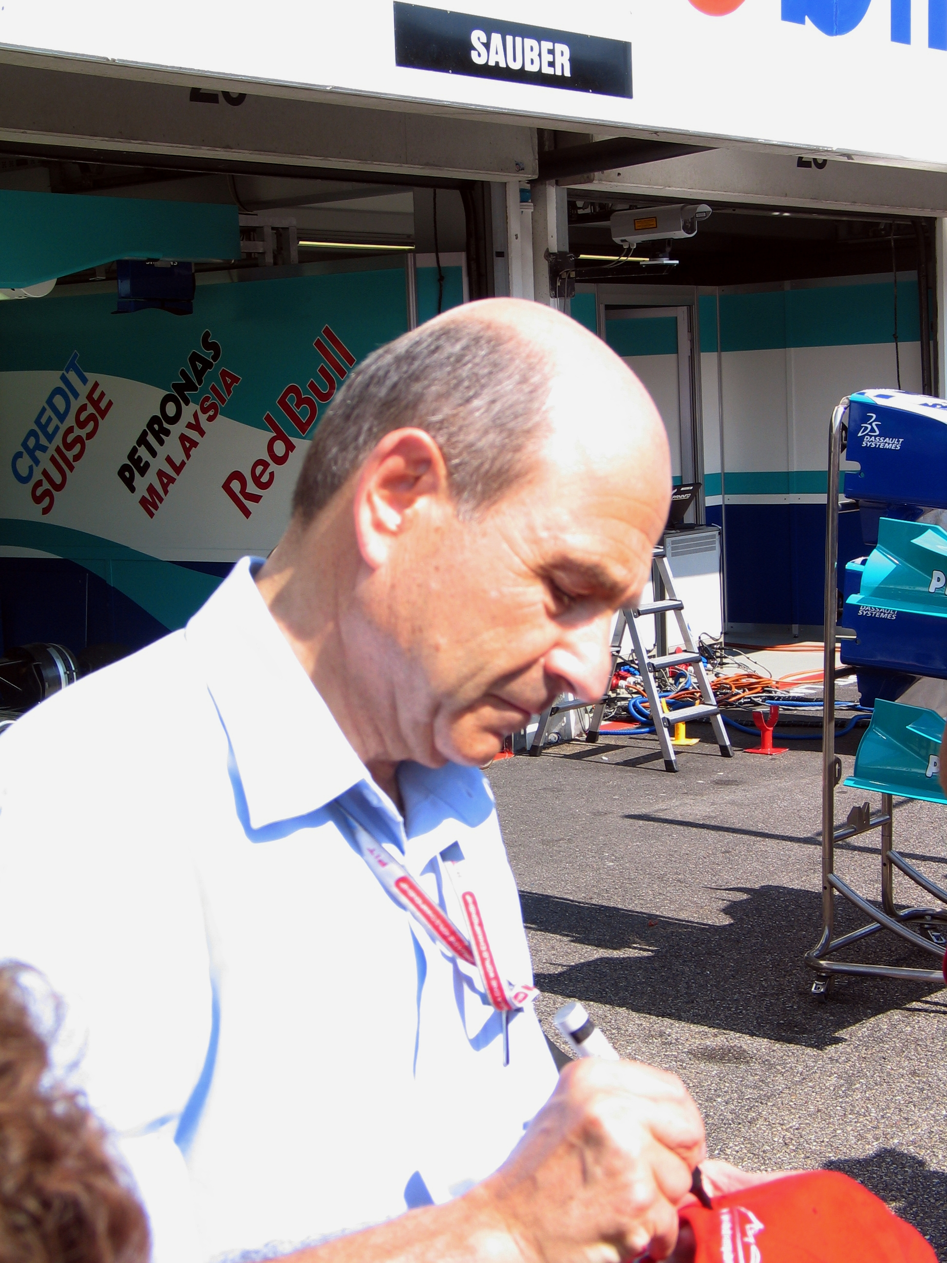 Peter Sauber auf dem Hockenheimring 2004